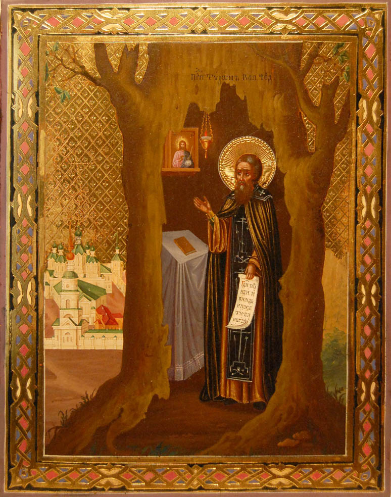 Икона «Св. Тихон Калужский» (22х18 см. Дерево, левкас, сусальное золото, темпера, творёное золото и серебро. Москва, начало XX века)